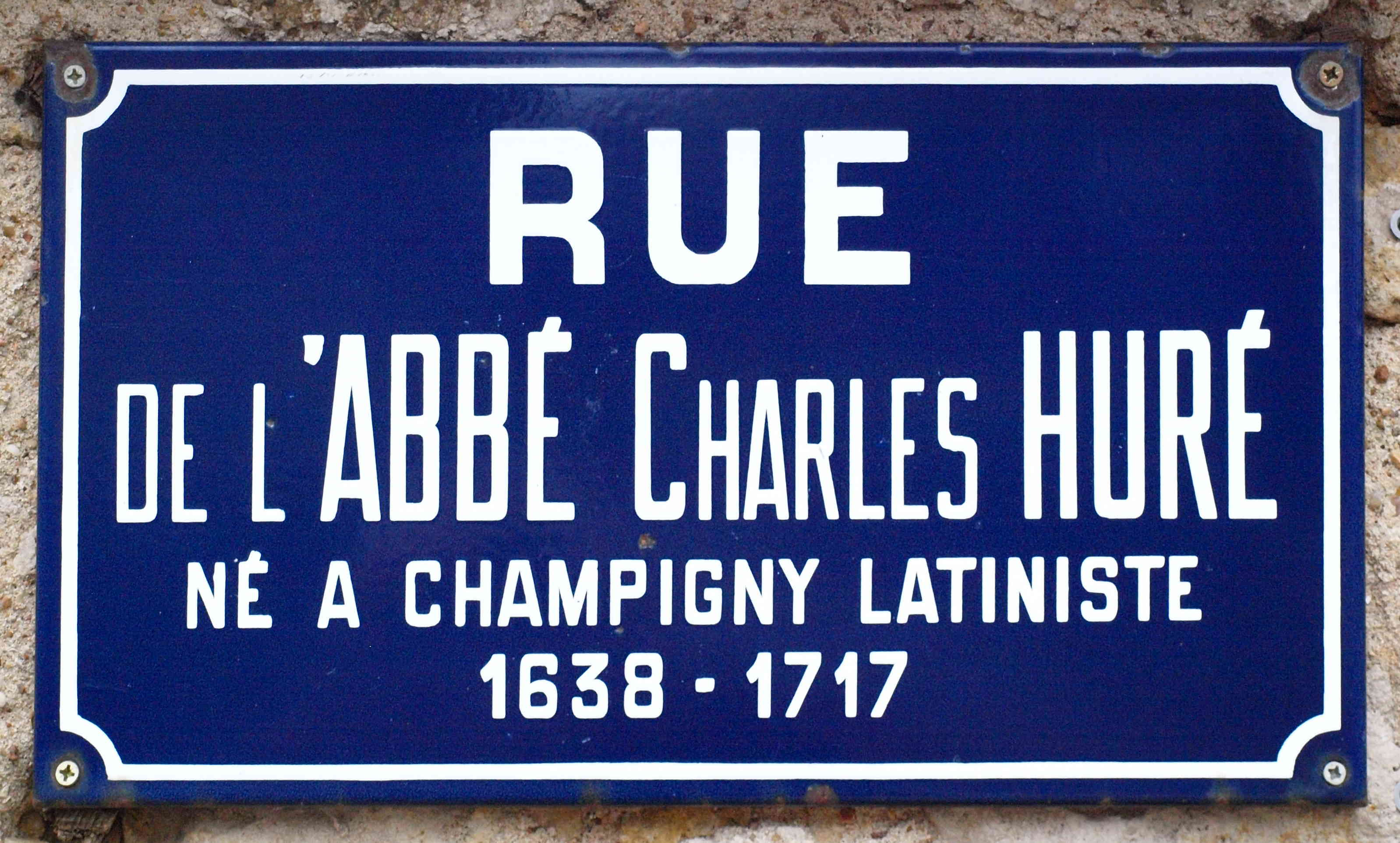 Champigny (Yonne, France) ; plaque de rue dédiée à Charles Huré, auteur de l'Encyclopédie théologique ou Série de dictionnaires en 52 volumes.